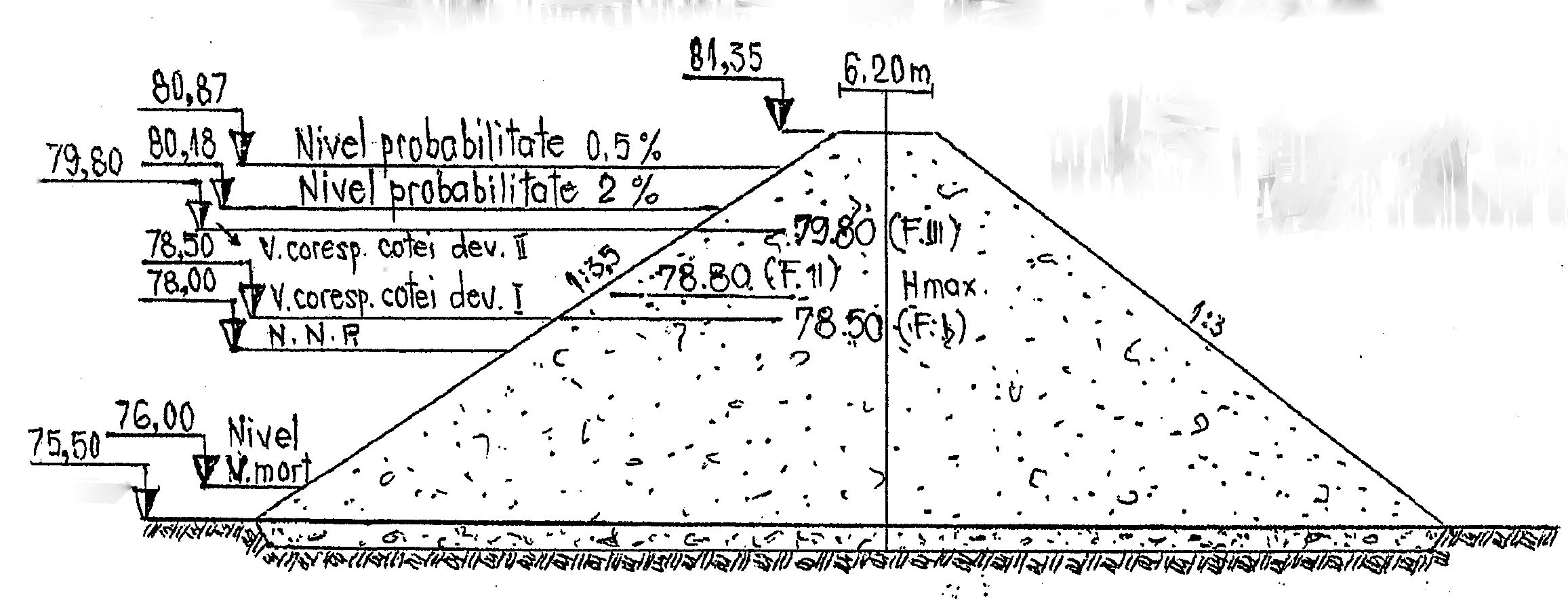 Secțiune transversală prin barajul Sulița După Desen tehnic impropriu pentru drepturi de autor conform art 84 din Legea 8/1996